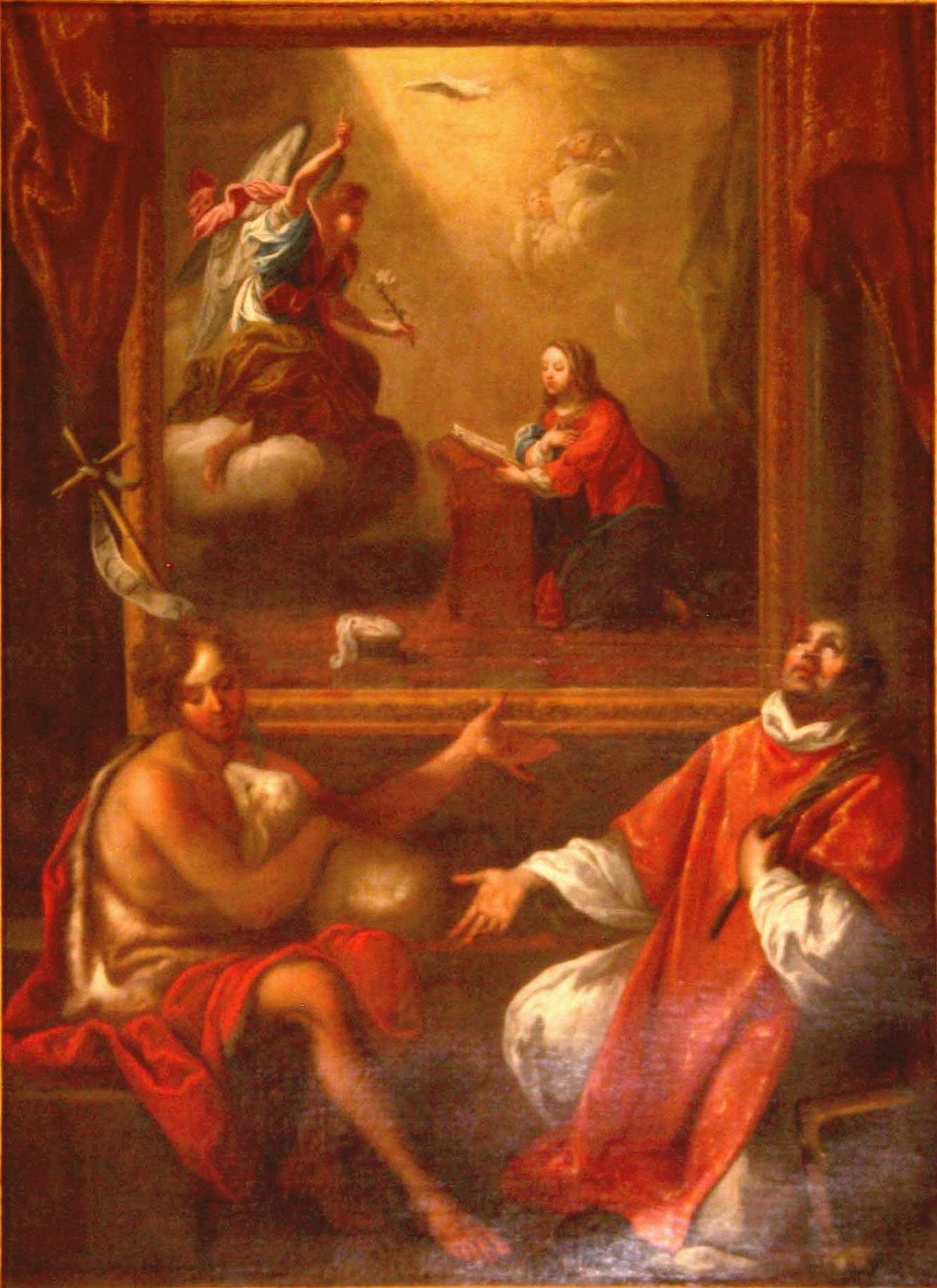 Tableau de Michel Serre dans l'église de la Pomme à Marseille représentant l'Annonciation, saint Jean-Baptiste et saint Etienne.